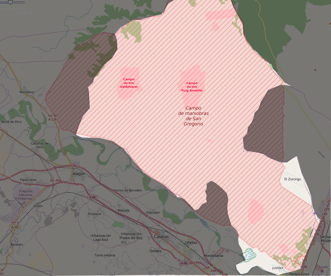 Mapa del distrito Juslibol-El Zorongo en Zaragoza.